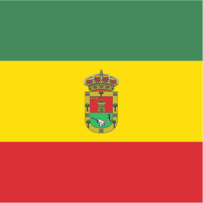 Bandera de Hontoria del Pinar. Bandera cuadrada compuesta por tres franjas horizontales: verde, amarilla y roja, y de anchuras respectivas 3-4-3. En el centro carga el escudo de la localidad. Bandera aprobada por el Ayuntamiento el 20 de junio de 2002. Publicada en el Boletín Oficial de Castilla y León el 19 de septiembre de 2002.